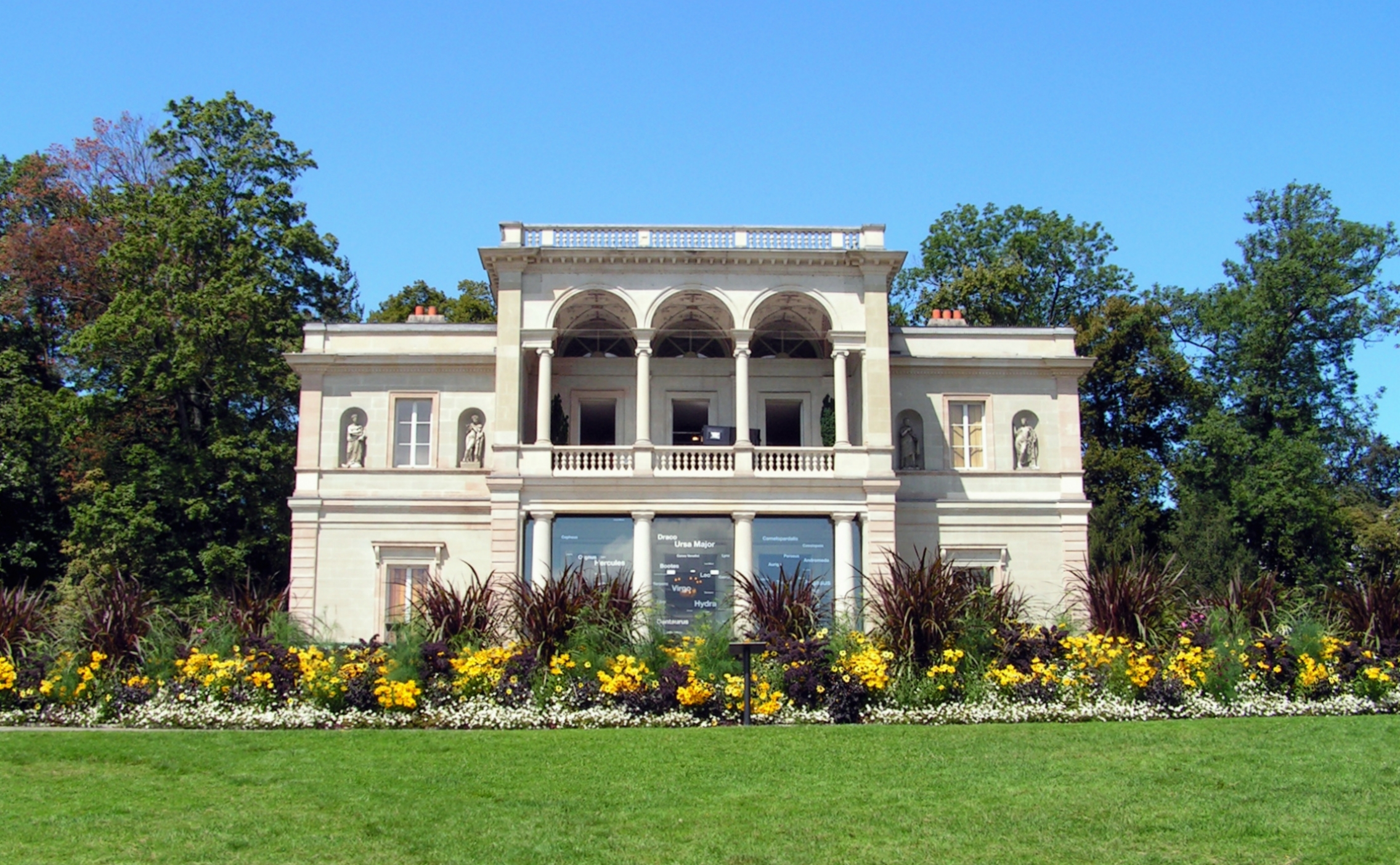 Rue de Lausanne 128, Genève. Villa Bartholoni.